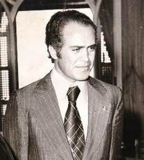 Portrait de Mohamed Sayah ancien de Habib Bourguiba